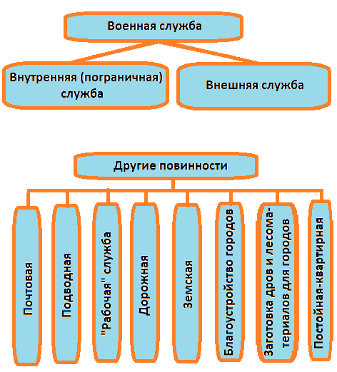 Повинности населения Башкортостана в период кантонной системы управления